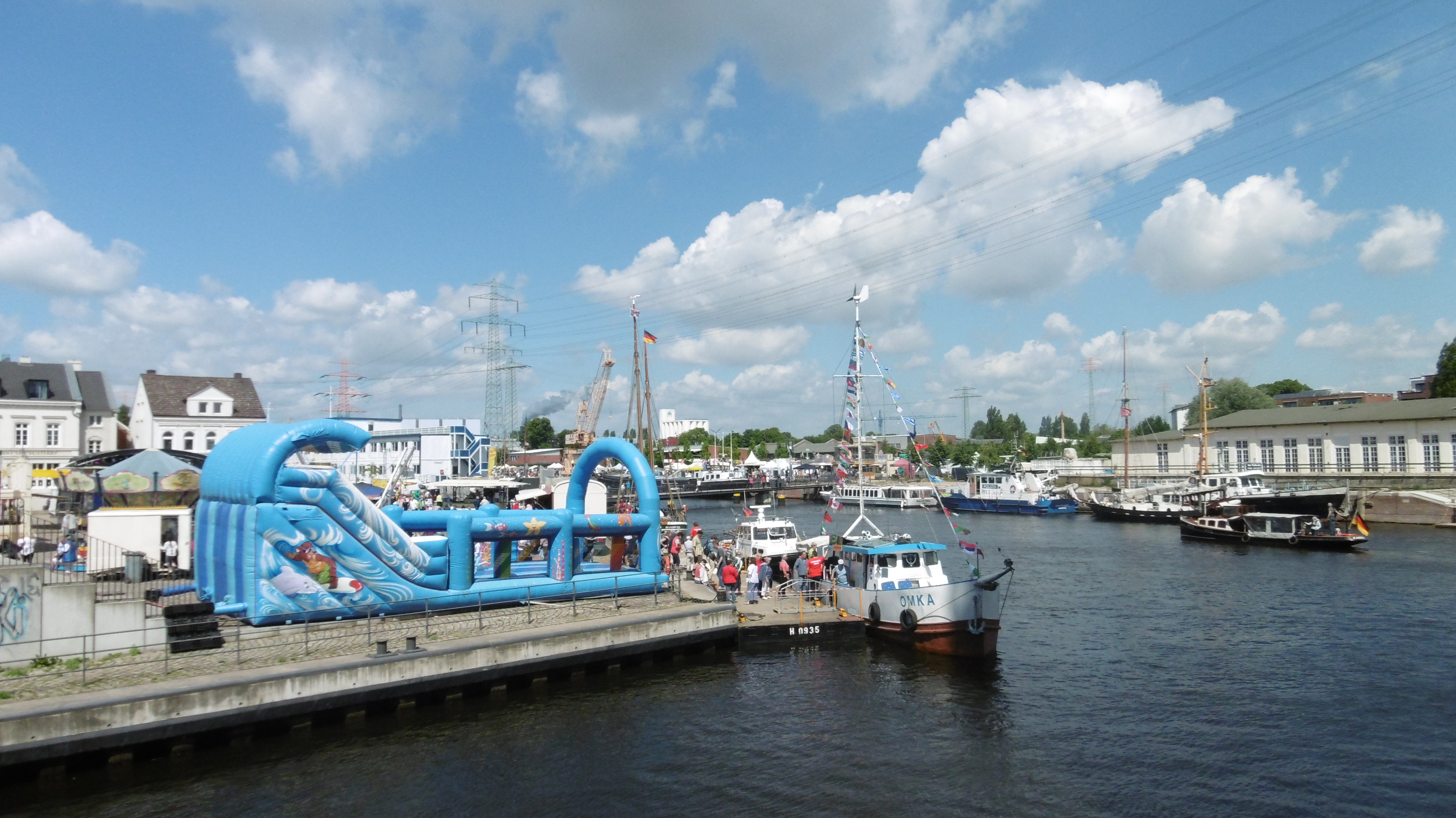 Dieses Bild zeigt das Harburger Binnenhafenfest 2017